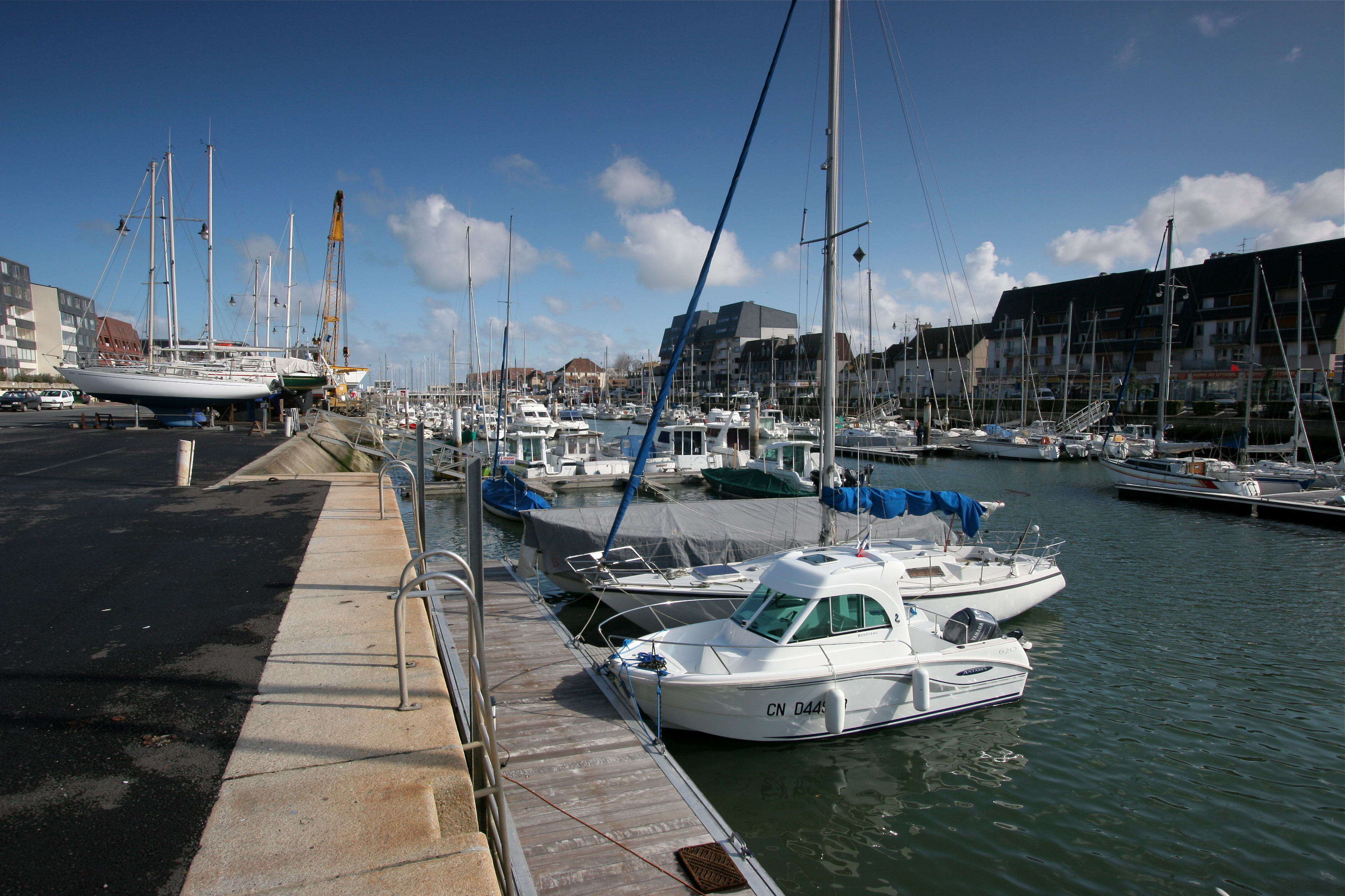 Port de plaisance de Courseulles sur Mer, Calvados, France